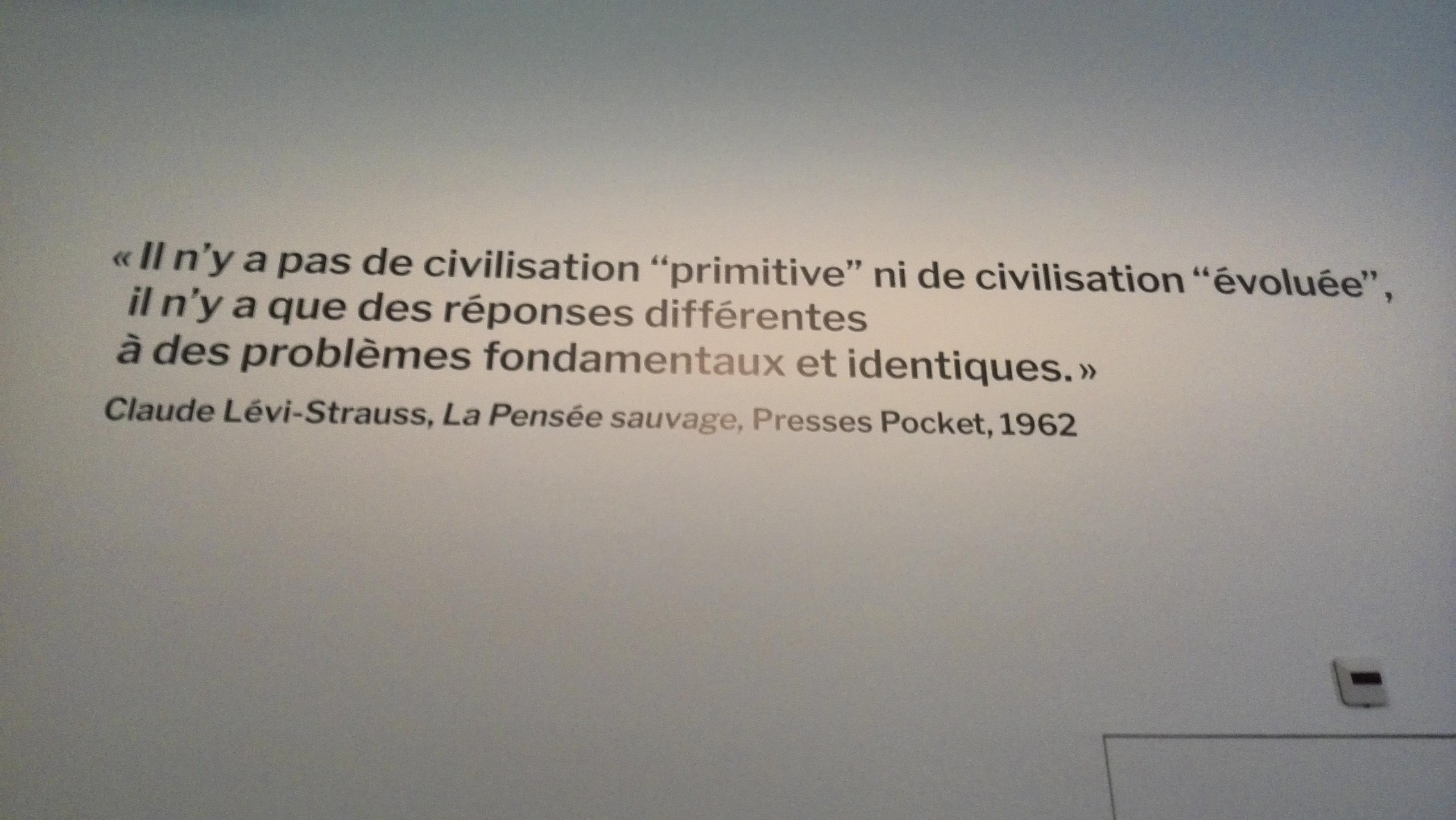 Claude Lévy-Strauss, citation tirée de "La pensée sauvage" - Musée de l'homme - Paris